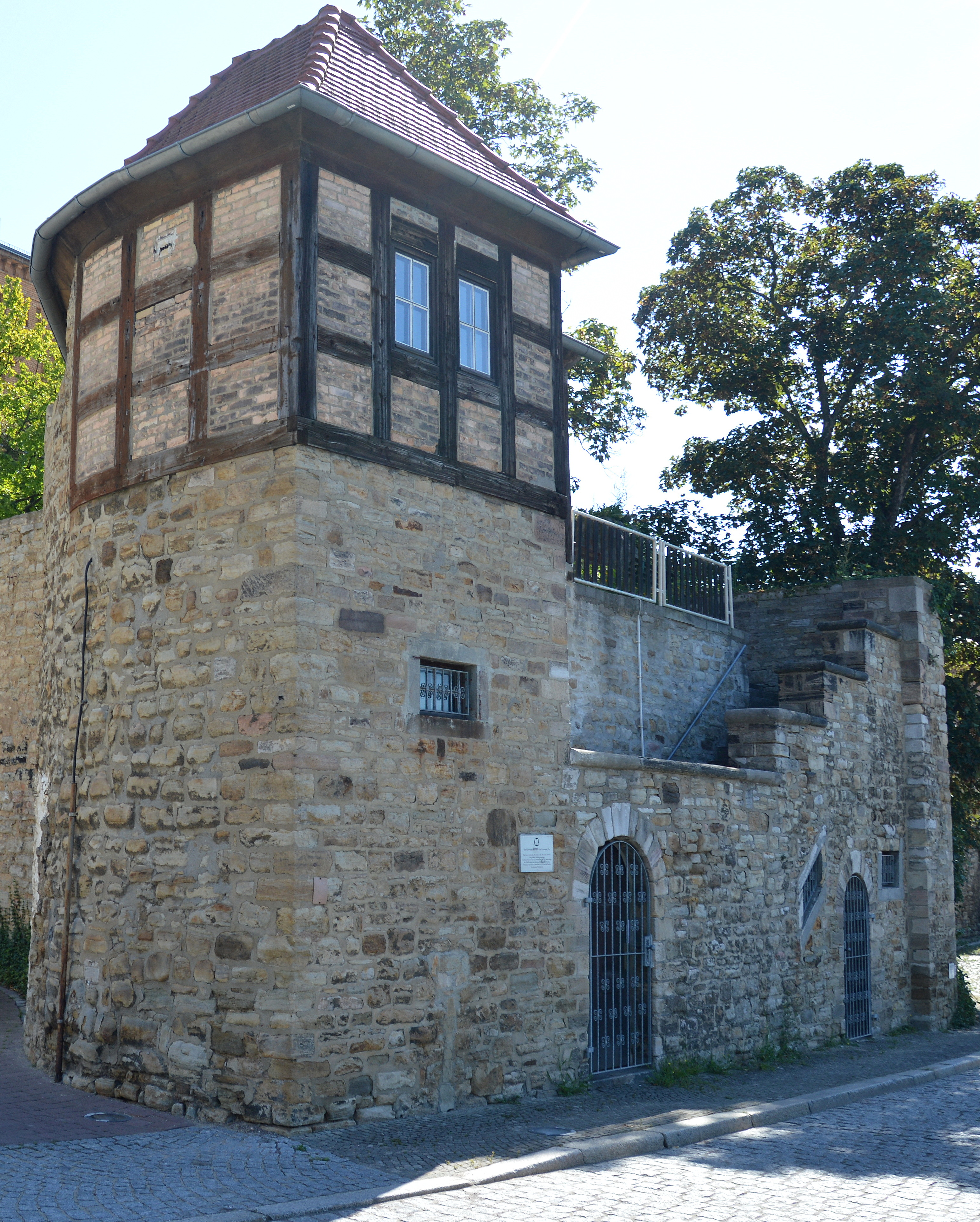 Reste Stadtbefestigung Merseburg